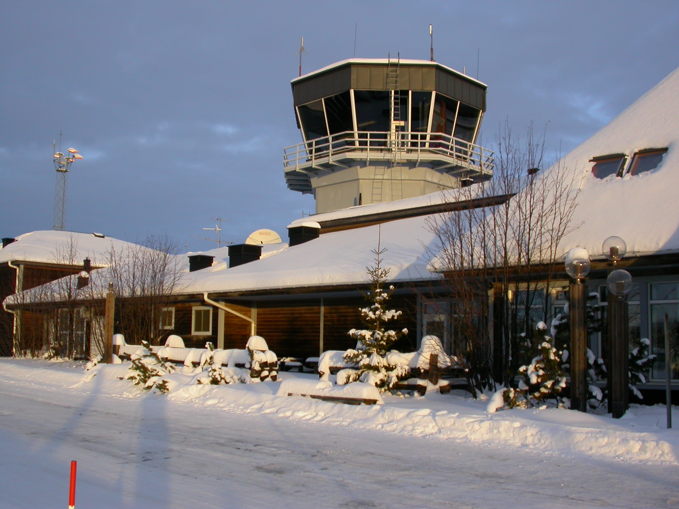 Tower und Gebäude des Flughafens Arvidsjaur